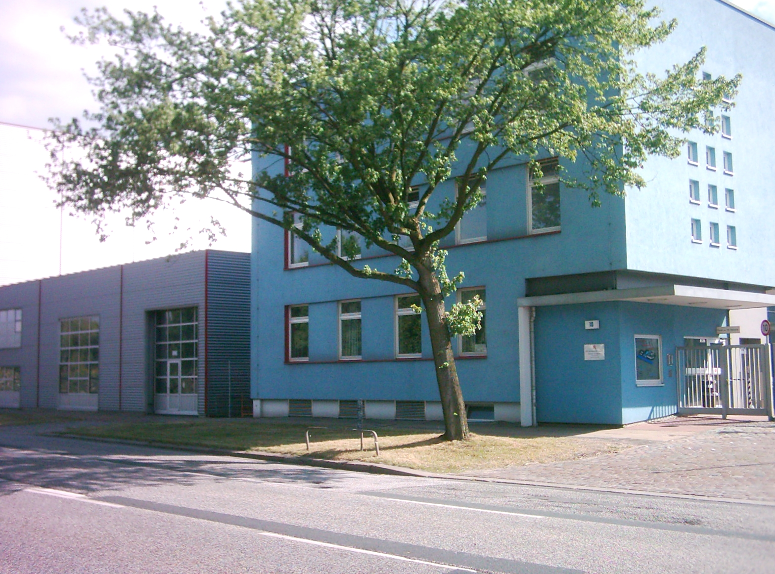 Das Technikzentrum der Feuerwehr Hamburg in Rothenburgsort. (Ehemaliger Sitz des Hygiene Instituts Hamburg, das sich heute in der Marckmannstraße befindet.)